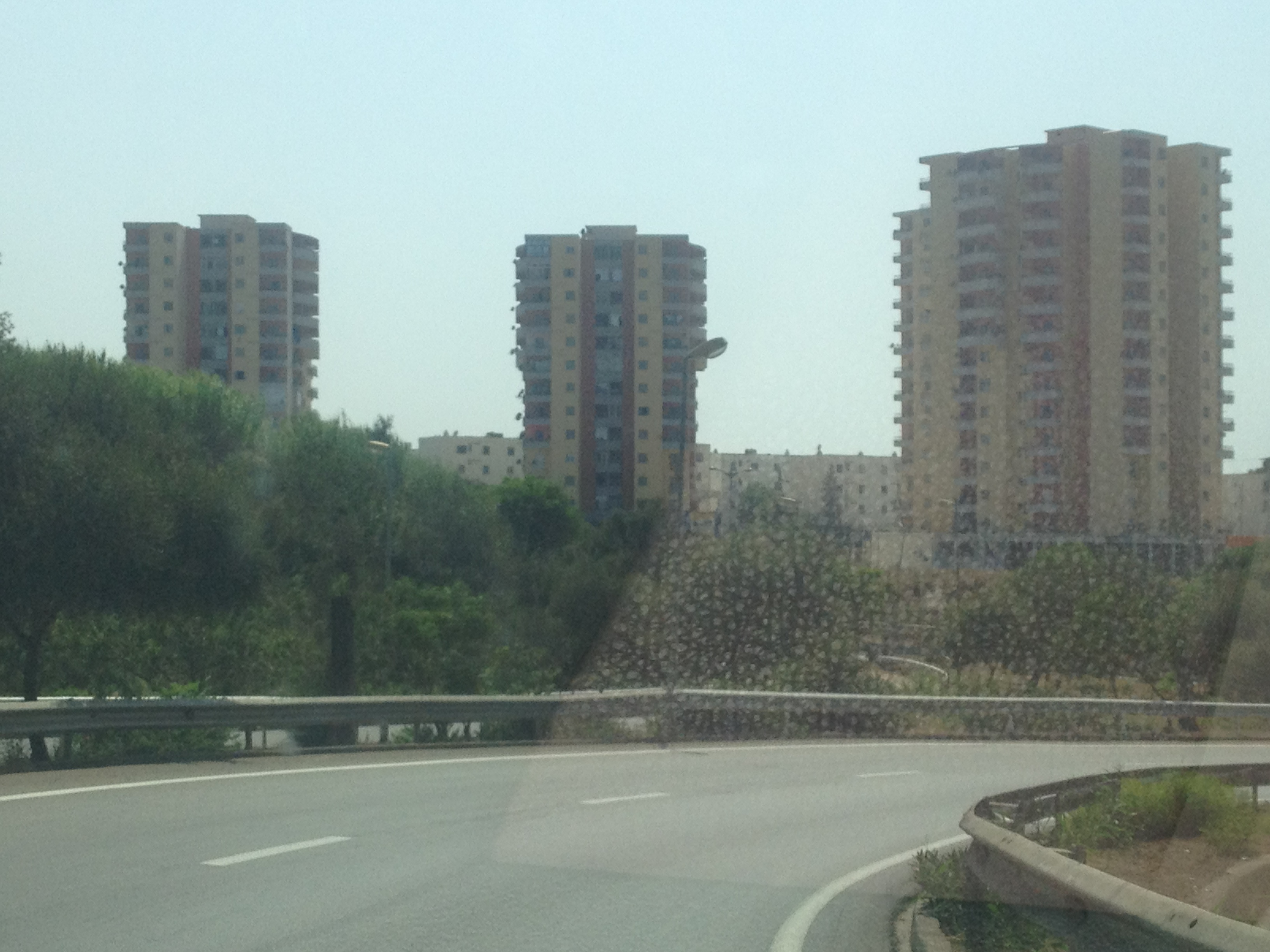 cité AAdl de Zeralda